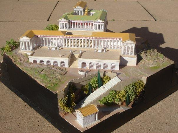 Description Maquette de l'acropole de Lindos Date1er janvier 2010Sourcephotographie personnelle de l'auteur de la maquette, Franck DevedjianAuthorFranck Devedjian, né le 12 août 1981 à Clamart (France) franckdevedjian(at)hotmail(pt)com Maquette de l'acropole de Lindos